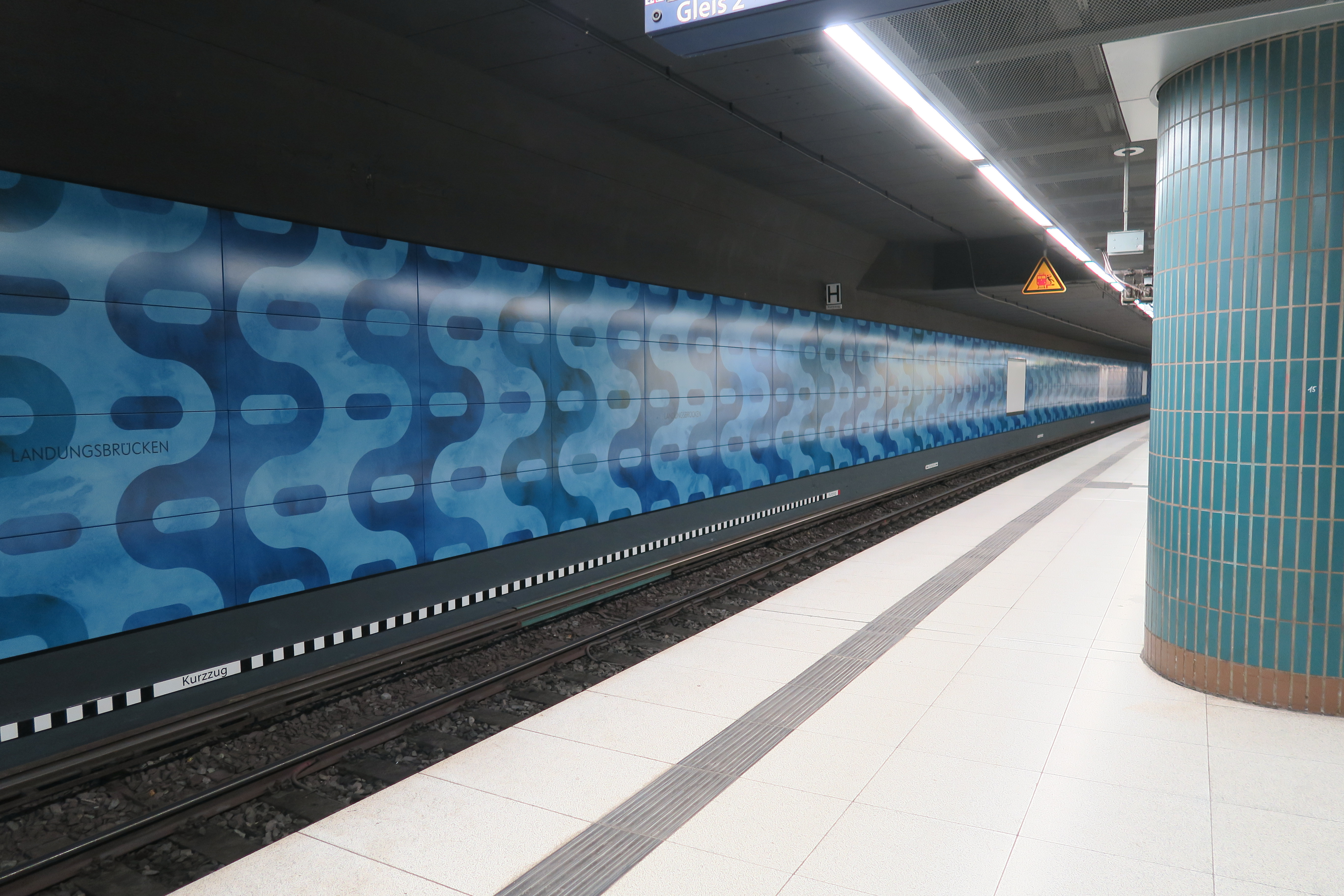 S-Bahnhof Landungsbrücken, November 2019